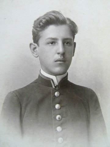 Євген Касьяненко